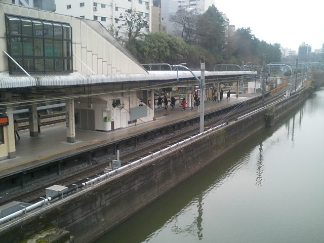 Ichigaya Station, Tokyo, Japan. 東京、市ヶ谷駅